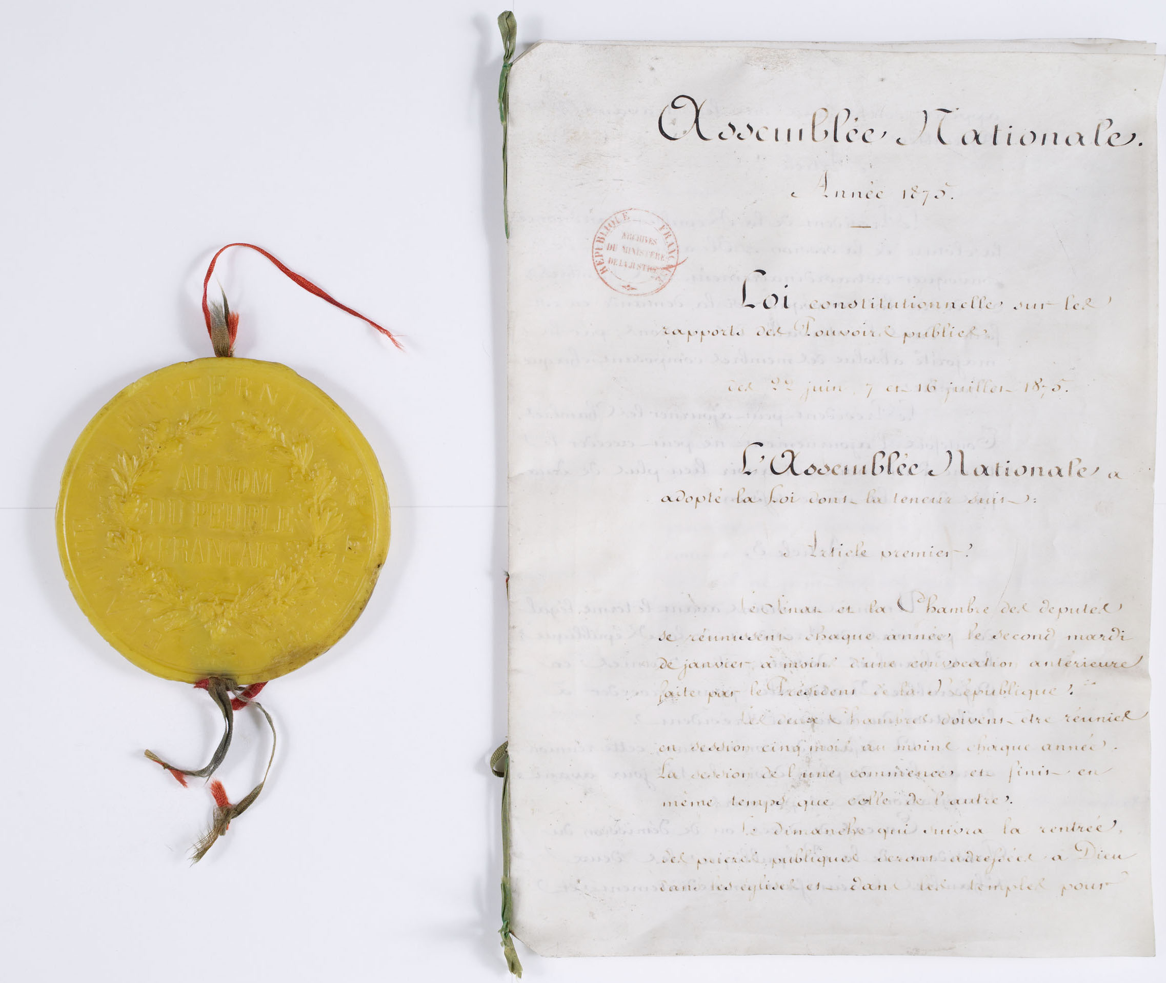 Original de la loi constitutionnelle des 22 juin, 7 juillet et 16 juillet 1875 relative aux rapports des pouvoirs publics et sceau ayant servi à la sceller portant la mention "Au nom du peuple français".